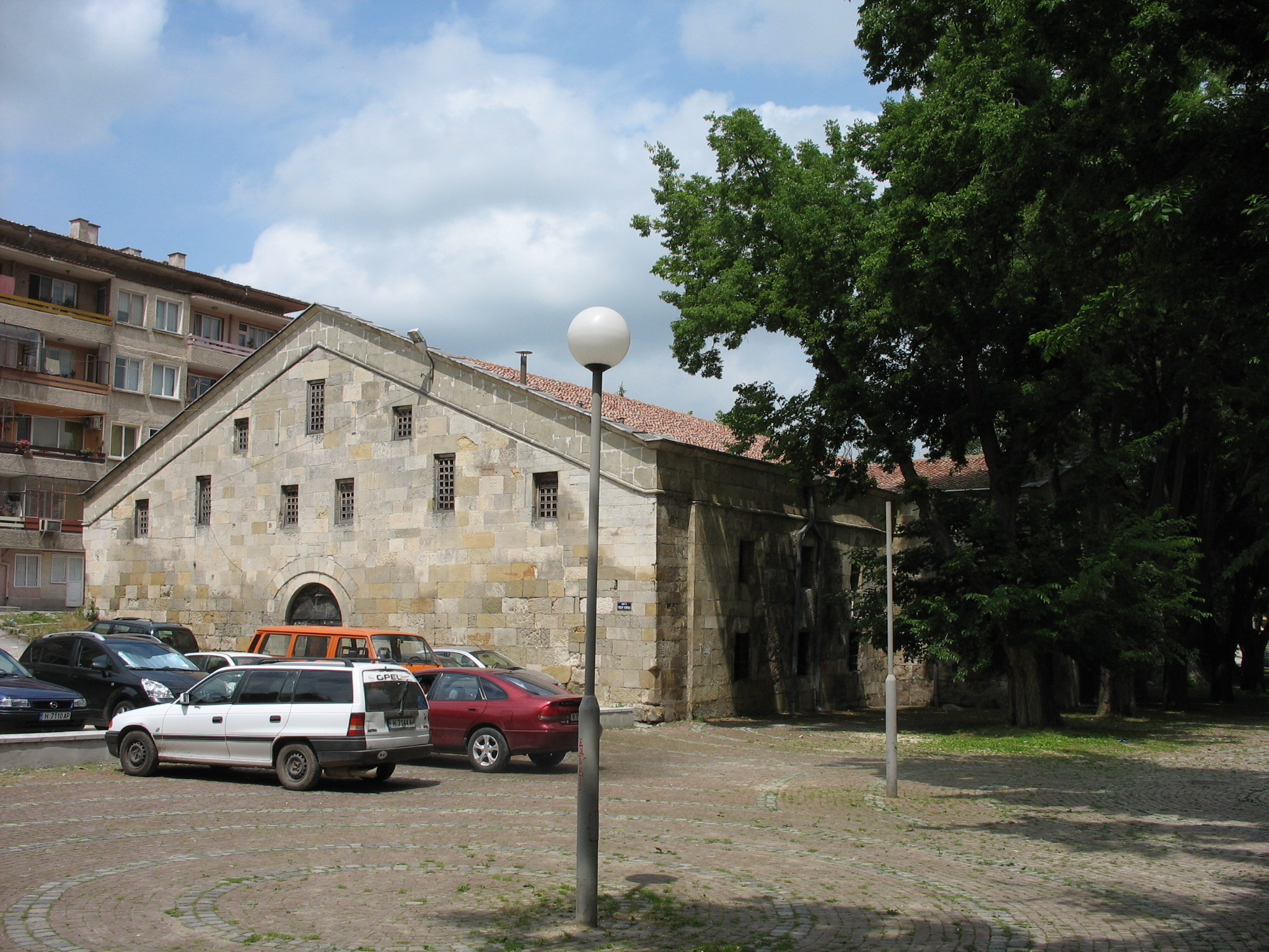 Shumen